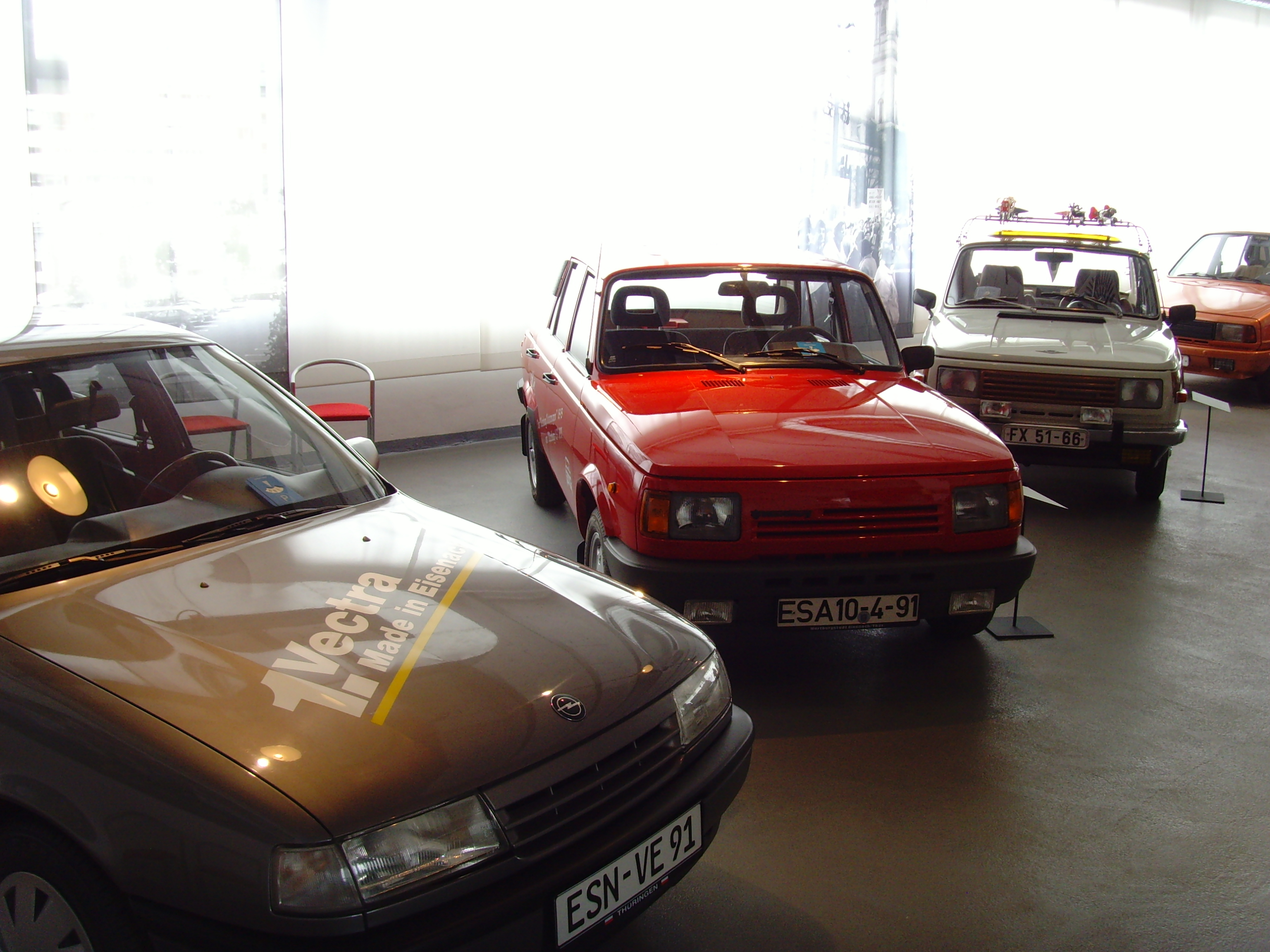 Wartburg und erster Opel Made in Eisenach